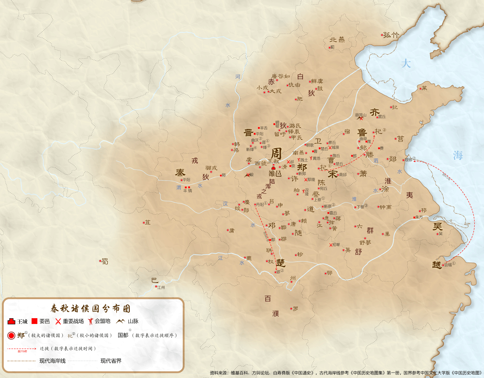 春秋諸侯國分佈圖 文言: 春秋列國輿圖